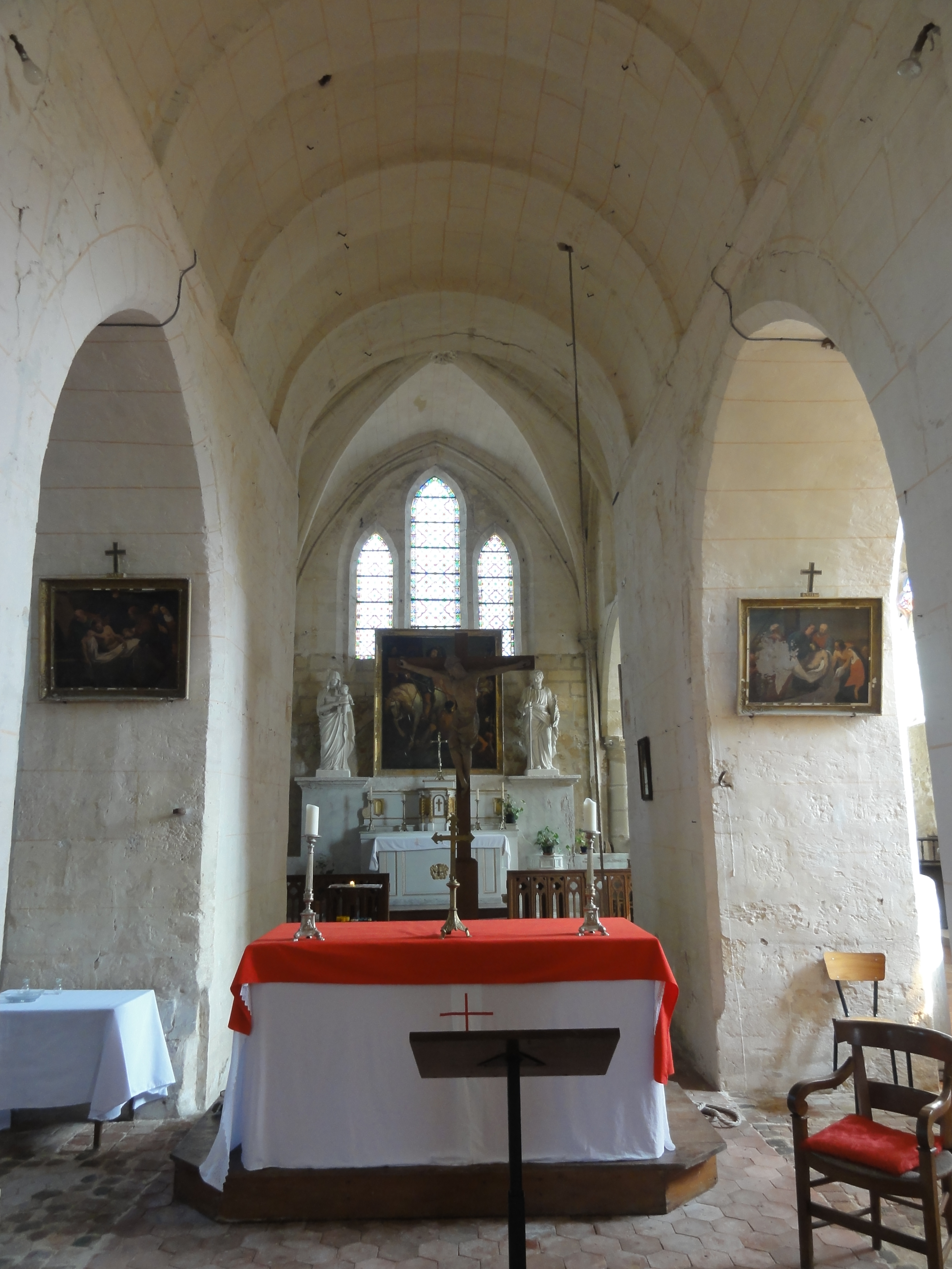 Intérieur de l'église - voir titre.